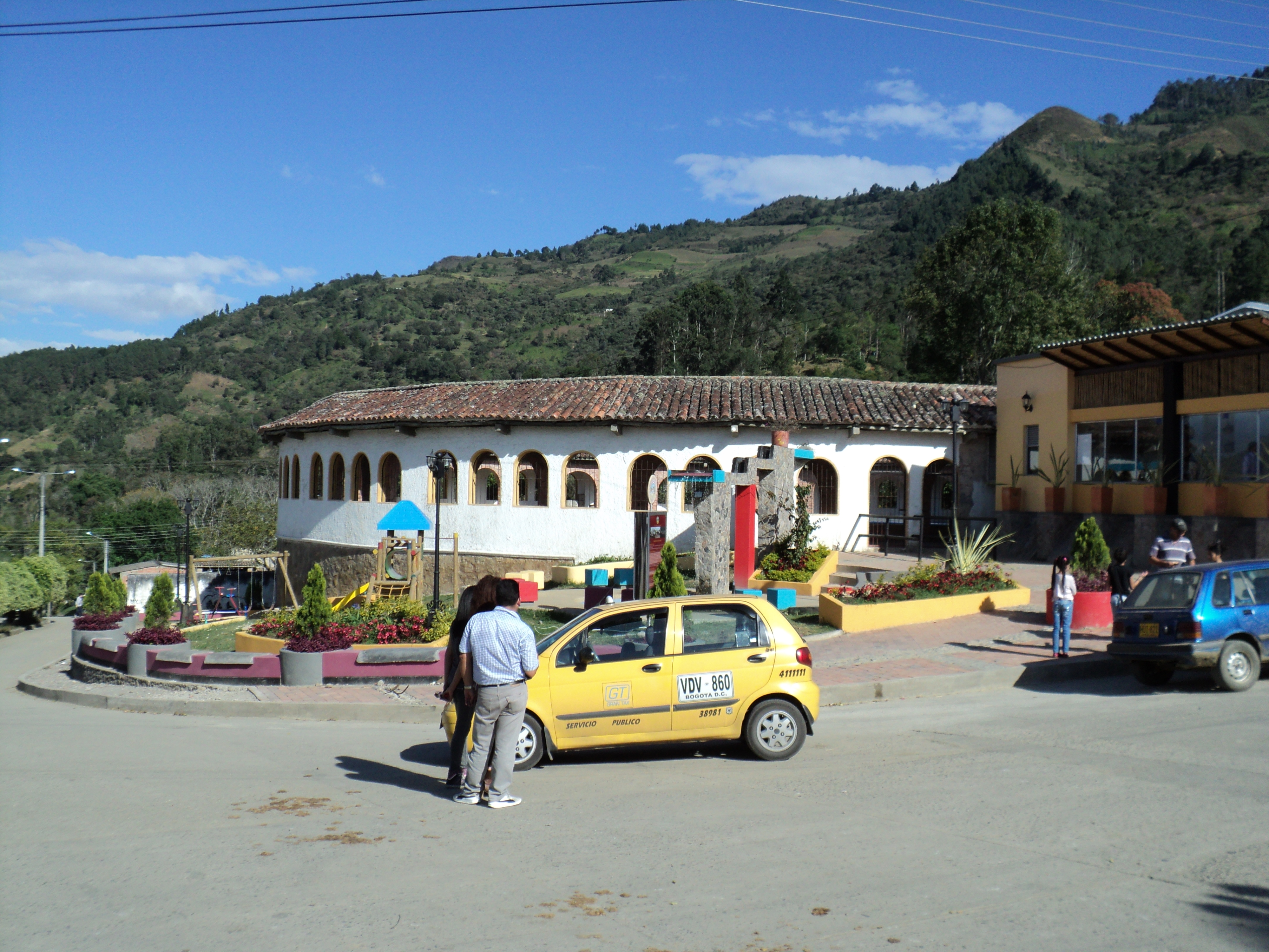 La plaza de toros de somondoco